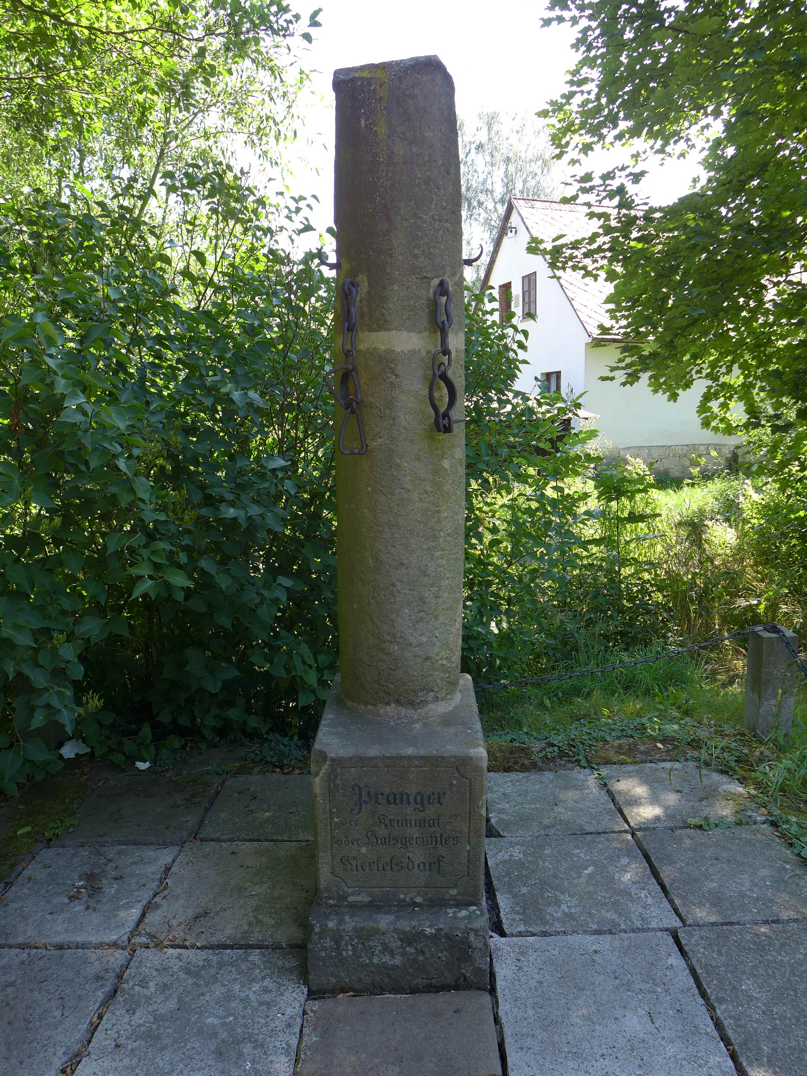 Pranýř, náves, Zdoňov.